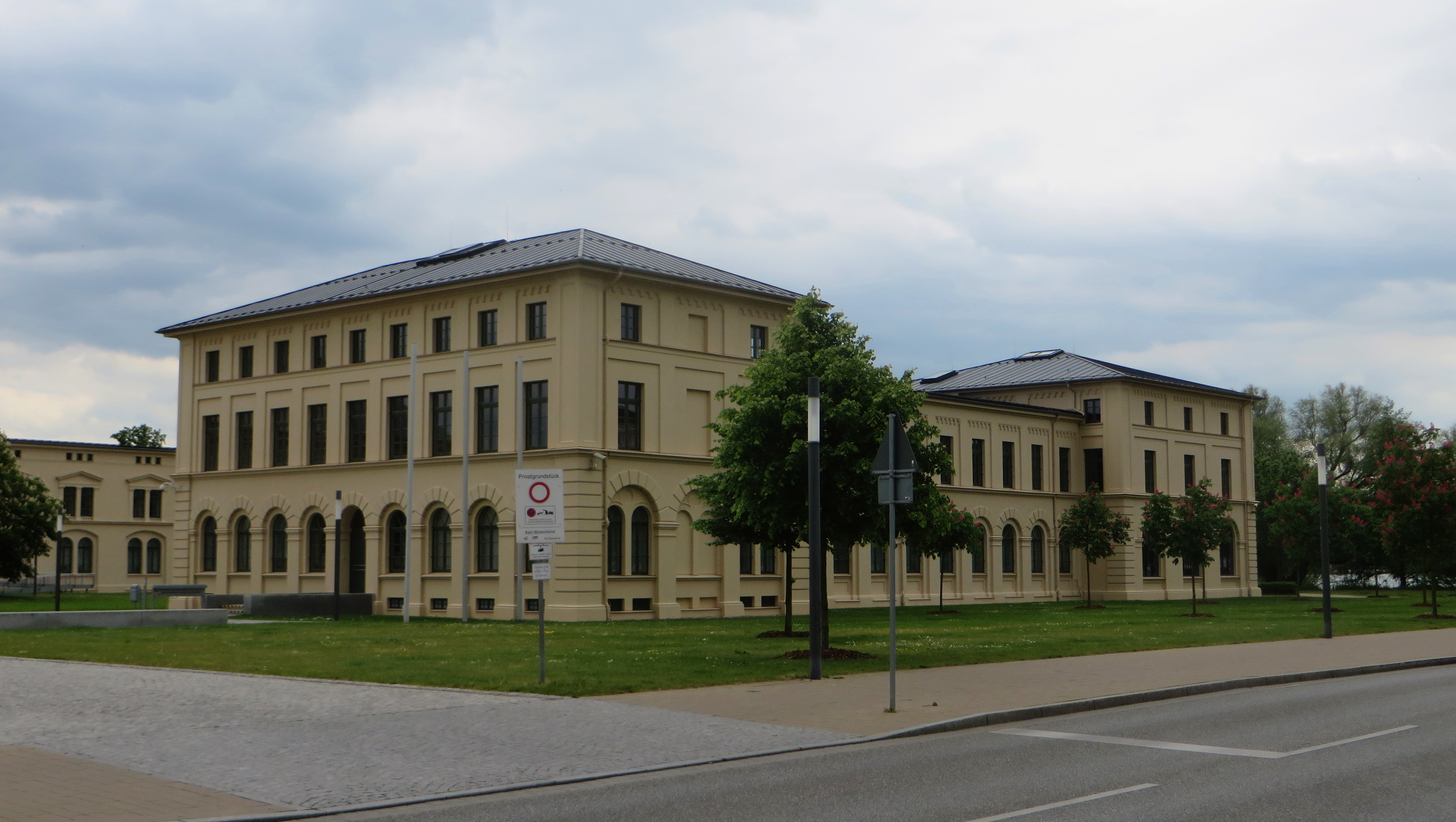 Im Südflügel des Marstalles in der Landeshauptstadt Schwerin ist das Ministerium für Arbeit, Gleichstellung und Soziales des Landes Mecklenburg-Vorpommern untergebracht.